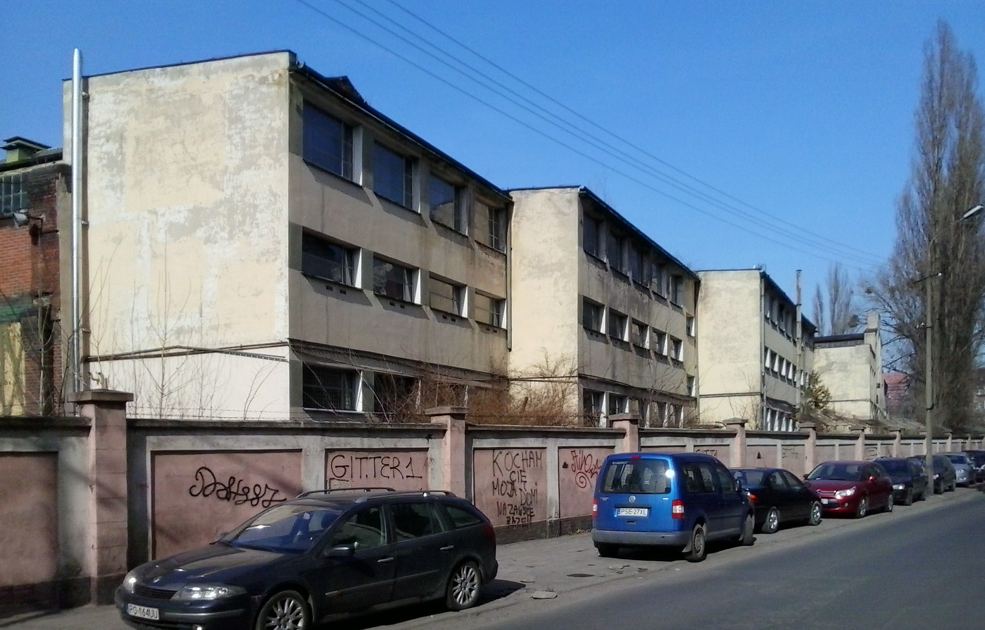 Poznań, ul. Robocza.